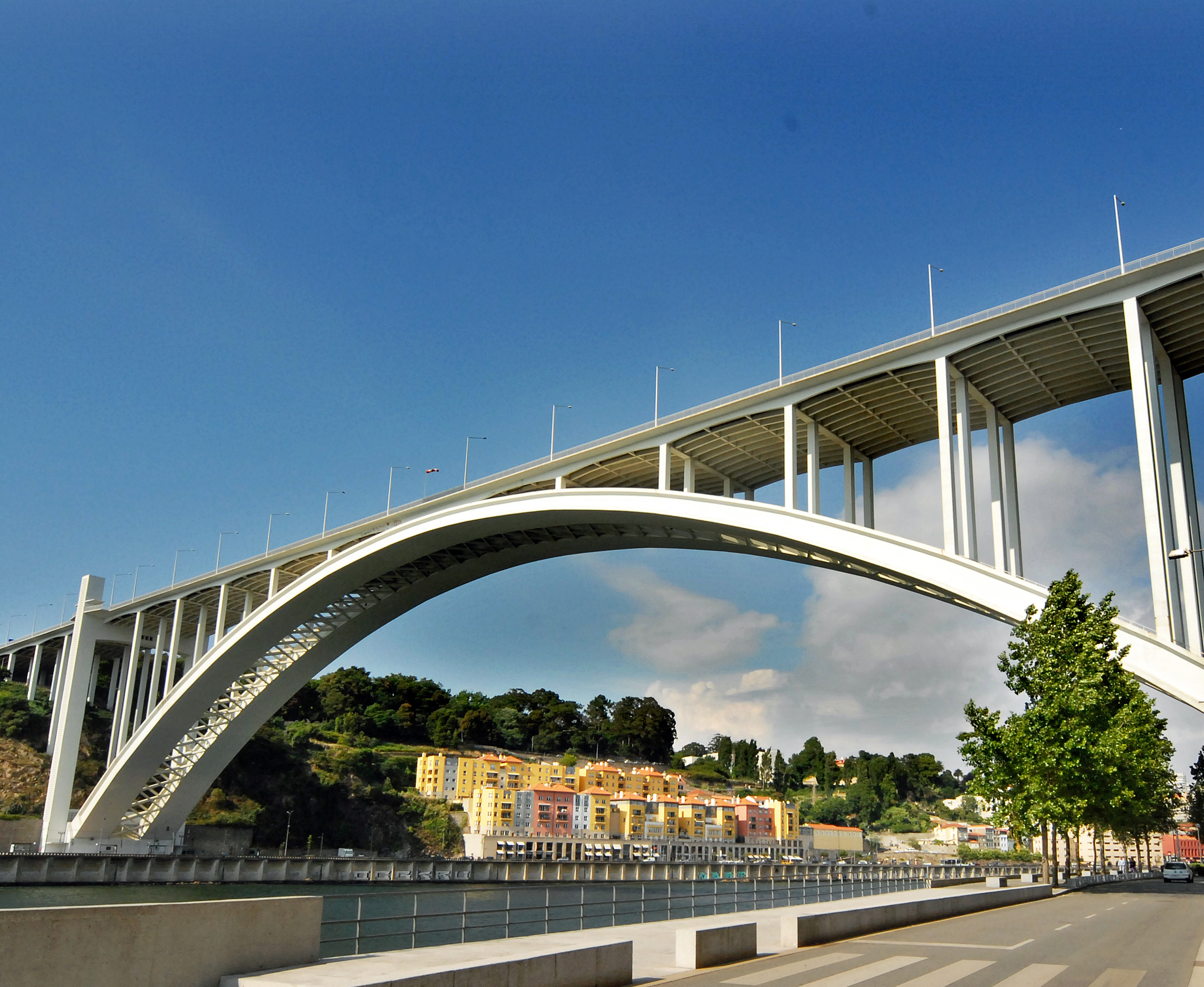 Ponte da Arrábida This file was uploaded for Wiki Loves Monuments in Portugal with the unique identifier 70797.